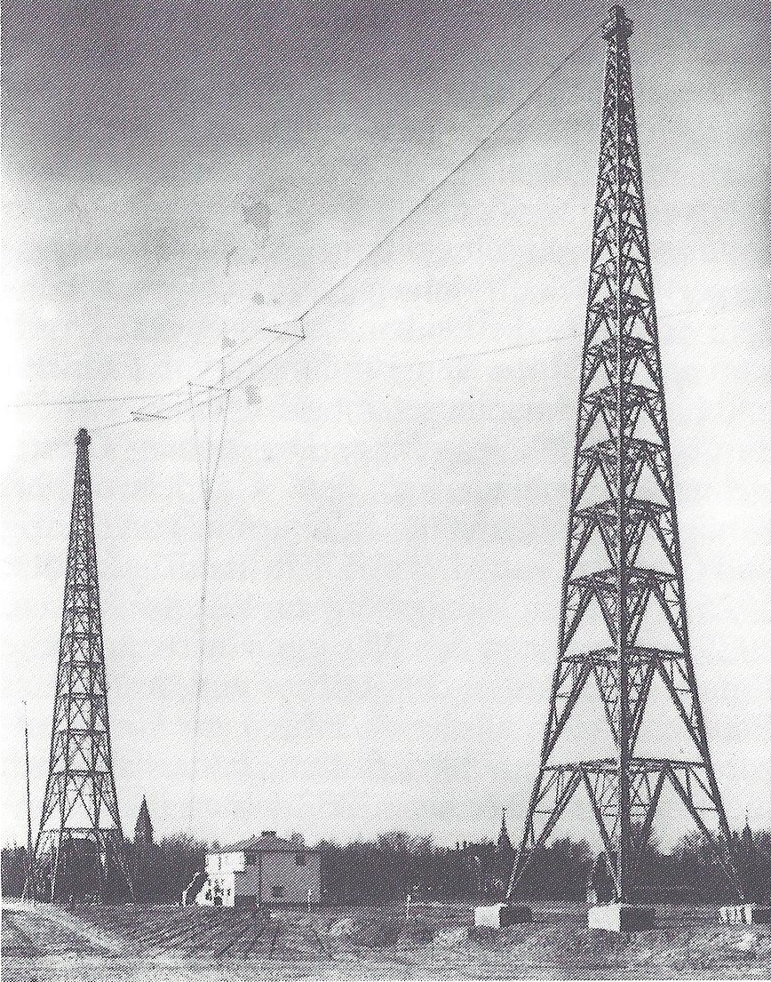 Sendemasten des Königsberger Rundfunks an der Alten Pillauer Landstraße, vor Einmündung in die Lawsker Allee